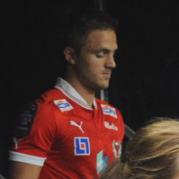 Mats Solheim